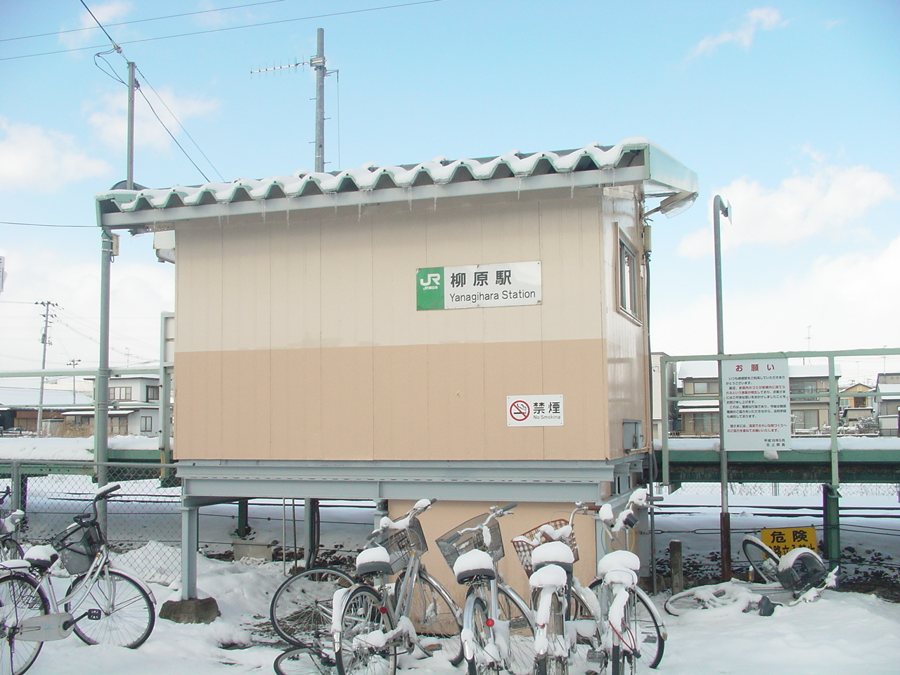 （柳原駅駅舎）